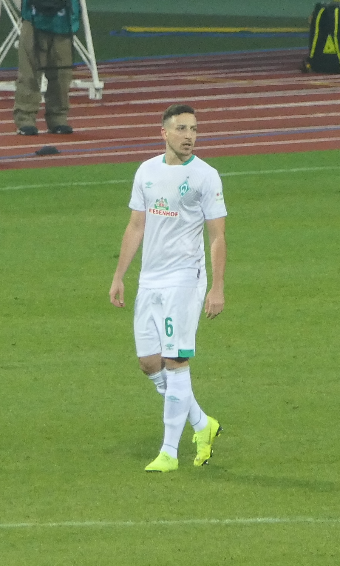 Der Fussballprofi Kevin Möhwald im Trikot vom SV Werder Bremen beim Auswärtsspiel gegen den 1.FC Nürnberg am 02.02.2019.